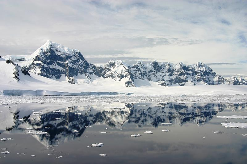 Luigi peak 1.415 m, Sierra DuFief, Wiencke Island